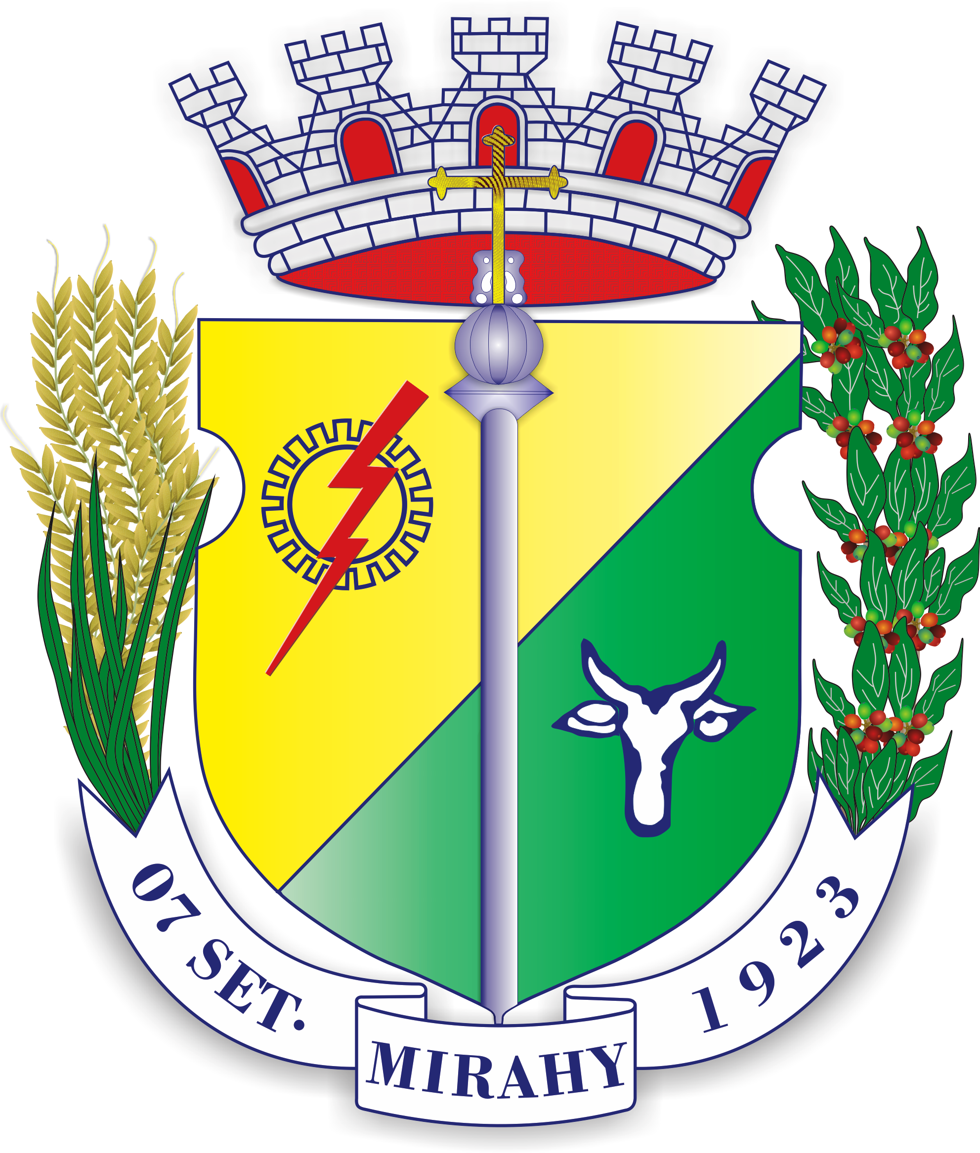 Brasão do Município de Miraí, Minas Gerais, Brasil